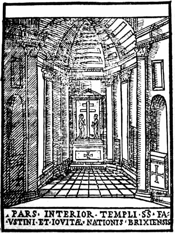 Stampa di Francino